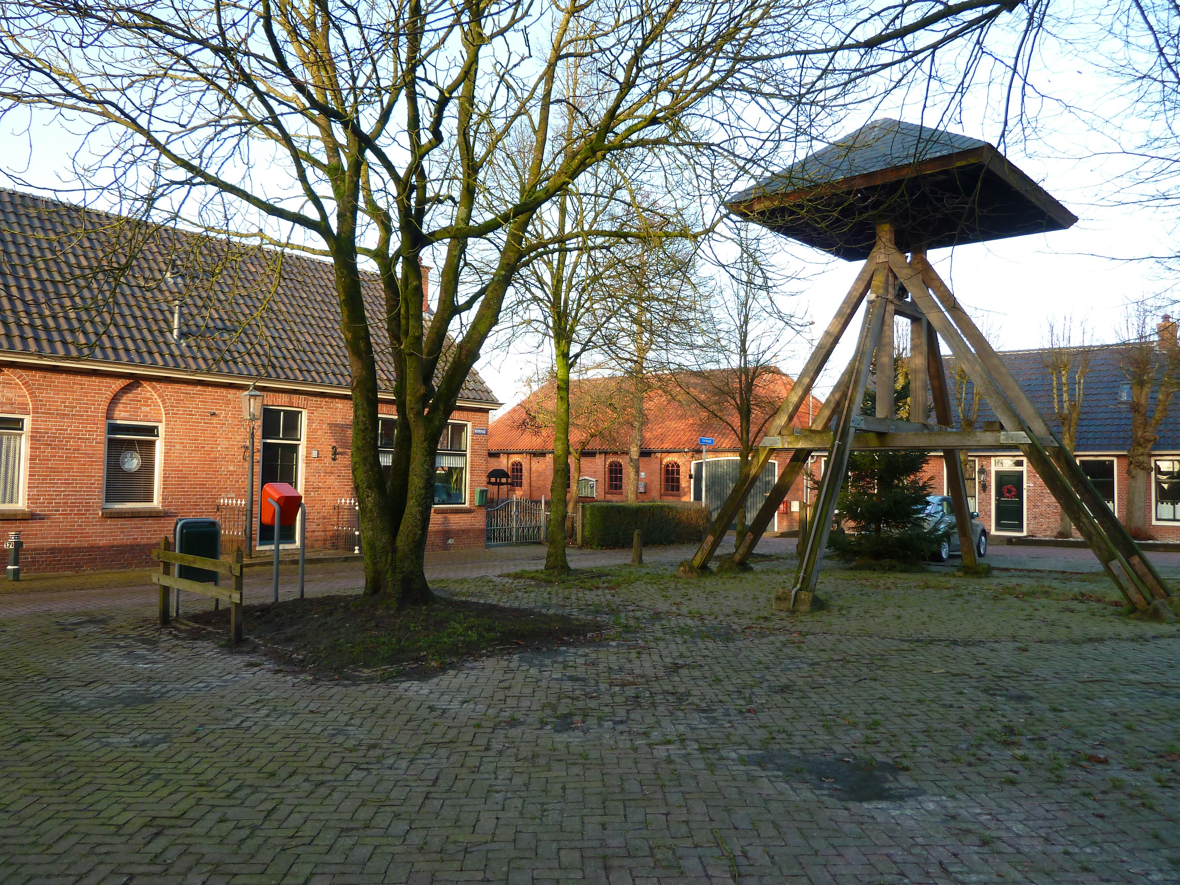 Klokkenstoel van Sint-Annen met links de voormalige kerk (nu woning) en op de achtergrond het voormalige café.